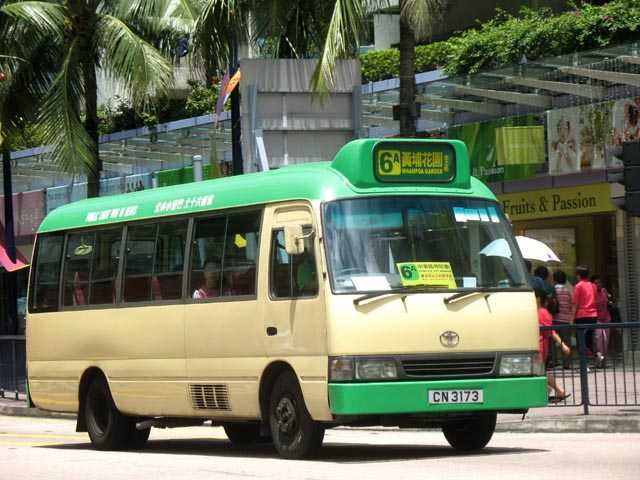 Hong Kong Green Minibus Kowloon 6A CN3173-1